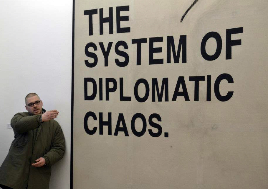 Florian Heinke, Künstlergespräch im Nassauischen Kunstverein Wiesbaden e.V.